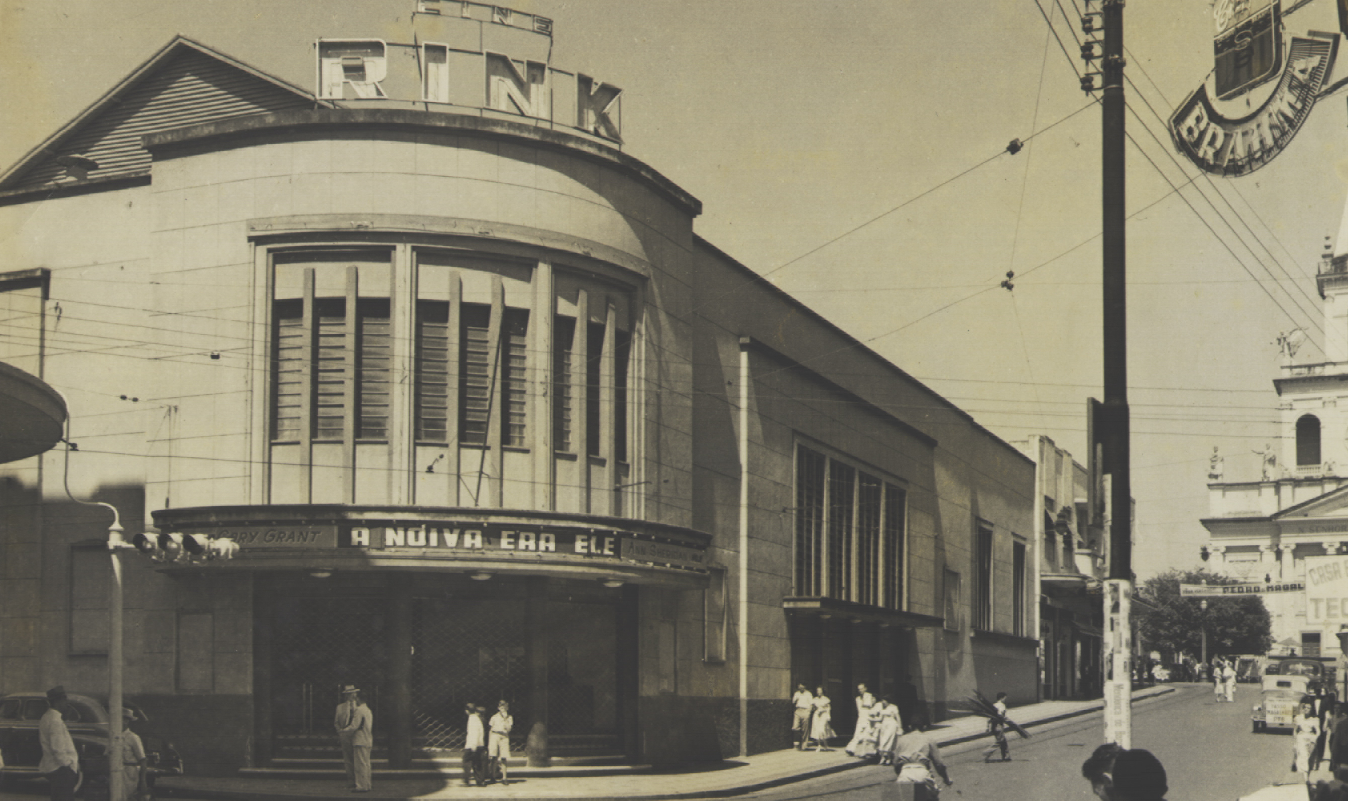 Obra que integra o acervo do Museu Paulista da USP. Coleção Werner Haberkorn